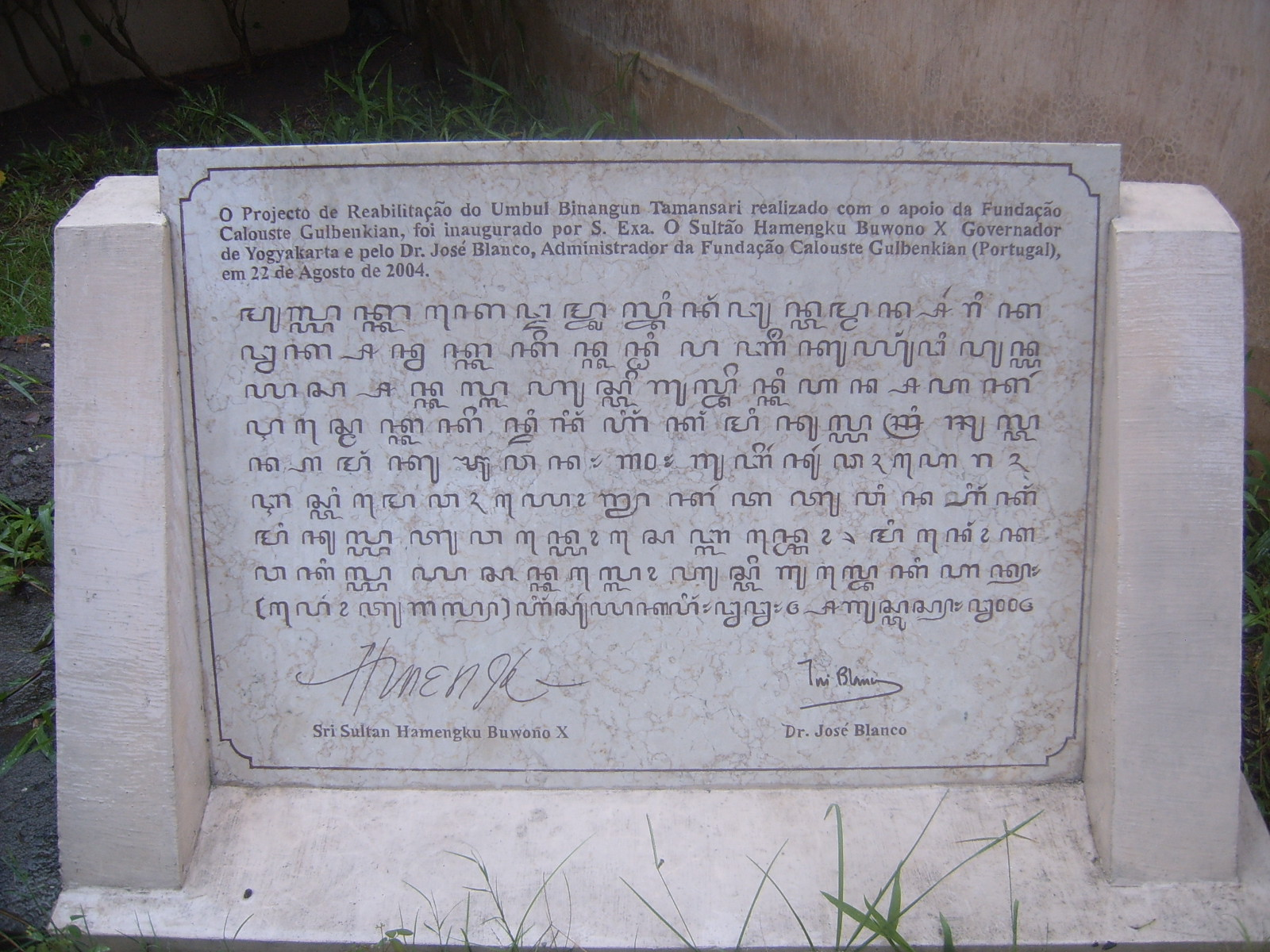 Javanese_script at the Water Palace, Jogjakarta - bilingual Portuguese / Javanese. Transcription and transliteration by R.S. Wihananto O Projecto de Reabilitação do Umbul Binagun Tamansari realizado com o apoio da Fundação Calouste Gulbenkian, foi inaugurado por S. Exa. O Sultão Hamengku Buwono X Governador de Yogyakarta e pelo Dr. José Blanco, Administrador da Fundação Calouste Gulbenkian (Portugal), em 22 de Agosto de 2004. ꦩꦸꦭ꧀ꦪꦏ꧀ꦏꦏꦺ​ꦈꦩ꧀ꦧꦸꦭ꧀ꦧꦶꦤꦁꦔꦸꦤ꧀ꦠꦩ꧀ꦩꦤ꧀ꦱꦂꦫꦶ​ꦏꦊꦏ꧀ꦱꦤ꧀ꦤꦏ꧀ꦏꦏꦼꦤ꧀ꦏꦤ꧀ꦛꦶ​ꦥꦚꦼꦁꦏꦸꦪꦸꦁꦔꦶꦥꦸꦤ꧀ꦪꦪꦱ꧀ꦱꦤ꧀ꦏꦭ꧀ꦭꦲꦸꦱ꧀ꦠꦼ​ꦒꦸꦭ꧀ꦧꦼꦤ꧀ꦏꦶꦲꦤ꧀ꦱꦲ​ꦏꦂꦉꦱ꧀ꦩꦺꦏ꧀ꦏꦏꦼꦤ꧀ꦢꦶꦤꦶꦁ​ꦲꦶꦁꦏꦁ​ꦩꦶꦤꦸꦭ꧀ꦪ​ꦯꦿꦶ​ꦯꦸꦭ꧀ꦠꦤ꧀ꦲꦩꦁꦏꦸꦨꦸꦮꦤ꧇ ꧑꧐꧇ ꦒꦸꦧꦼꦂꦤꦸꦂ​ꦝꦃꦲꦺꦫꦃ​ꦆꦱ꧀ꦠꦶꦩꦺꦮꦃ​ꦪꦺꦴꦒꦾꦏꦂꦠ​ꦠꦸꦮꦶꦤ꧀ꦲꦶꦁꦏꦁ​ꦩꦶꦤꦸꦭ꧀ꦪ​ꦠꦸꦮꦤ꧀ꦪꦺꦴꦱꦺ​ꦧ꧀ꦭꦤ꧀ꦕꦺꦴ꧈ ꦩꦶꦤꦺꦴꦁꦏ​ꦮꦏꦶꦭ꧀ꦪꦪꦱꦤ꧀ꦏꦭ꧀ꦭꦺꦴꦲꦸꦱ꧀ꦠꦼ​ꦒꦸꦭ꧀ꦧꦺꦤꦏꦶꦲꦤ꧀꧇ (ꦥꦺꦴꦂꦠꦸꦒꦭ꧀) ꦲꦶꦁ​ꦱꦸꦂꦪ​ꦏꦥꦶꦁ꧇ ꧒꧒꧇ ꦄꦒꦸꦱ꧀ꦠꦸꦱ꧀꧇ ꧒꧐꧐꧔ Sri Sultan Hamengku Buwono X Dr. José Blanco Transliteration: Mulyakaké Umbul Binangun Tamansari kaleksanakaken kanṭi panyengkuyungipun Yayasan Kalauste Gulbenkian saha karesmèkaken dening Ingkang Minulya Sri Sultan Hamengkubuwana 10 Gubernur Daerah Istimewa Yogyakarta tuwin Ingkang Minulya Tuan Yosé Blanco, minongka wakil Yayasan Kalauste Gulbenkian (Portugal) ing surya kaping 22 Agustus 2004.